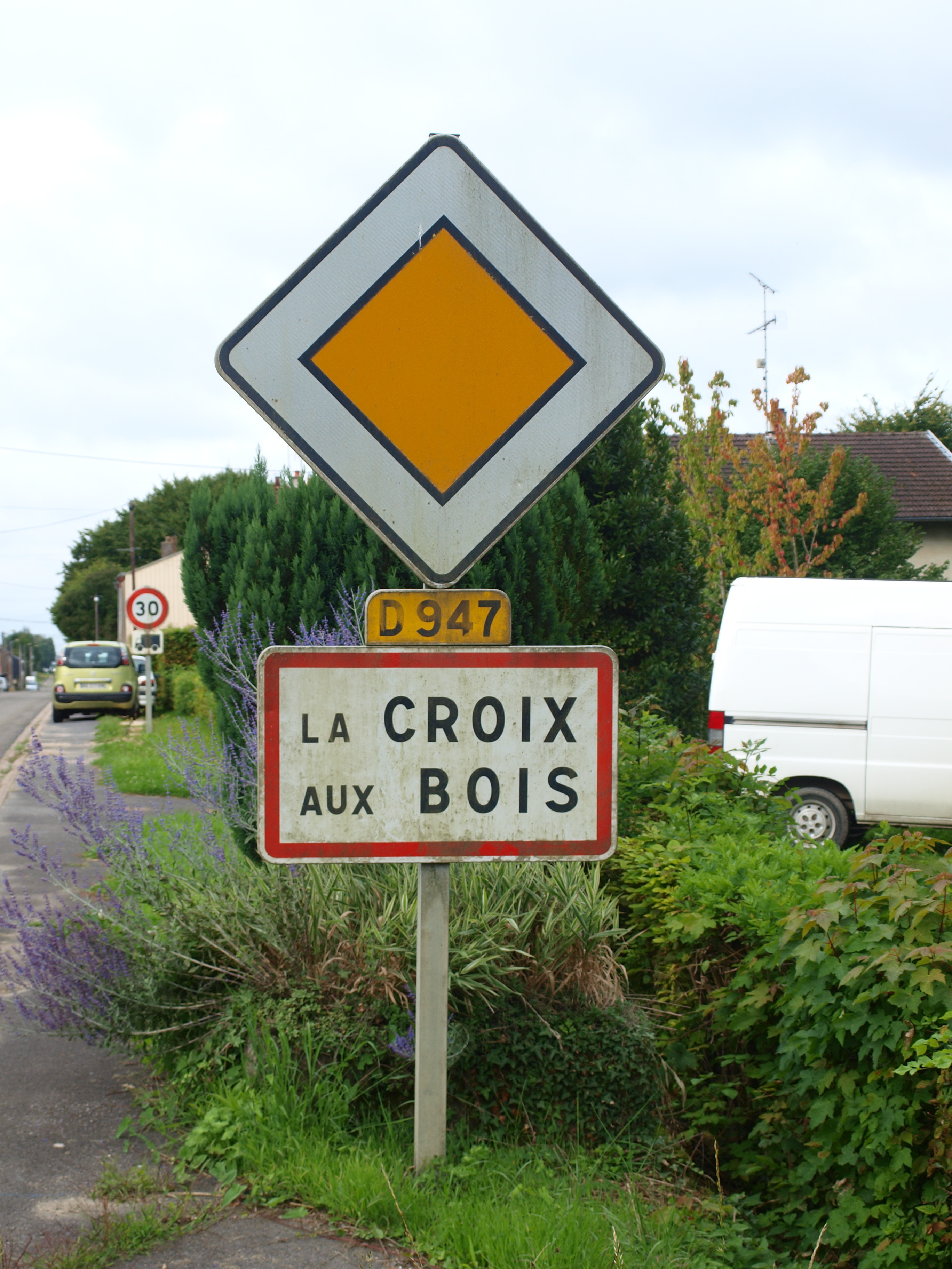 La Croix-aux-Bois (Ardennes, France) ; panneau d'agglomération